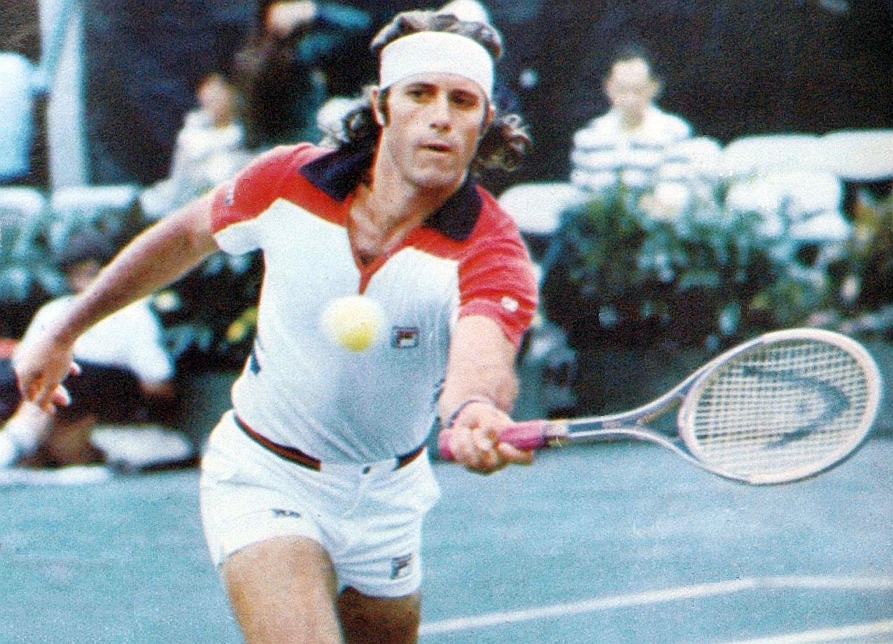 Guillermo vainqueur de l'US Open à Forest Hills - El Grafico del 13 de Septiembre de 1977, Edicion 3023